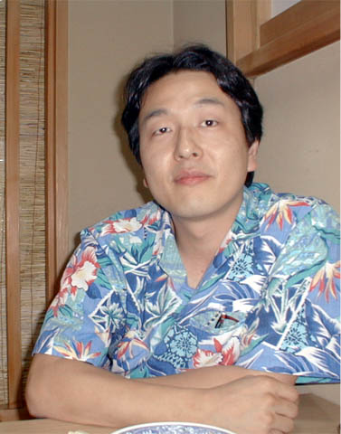 Portreto de Ono Takao